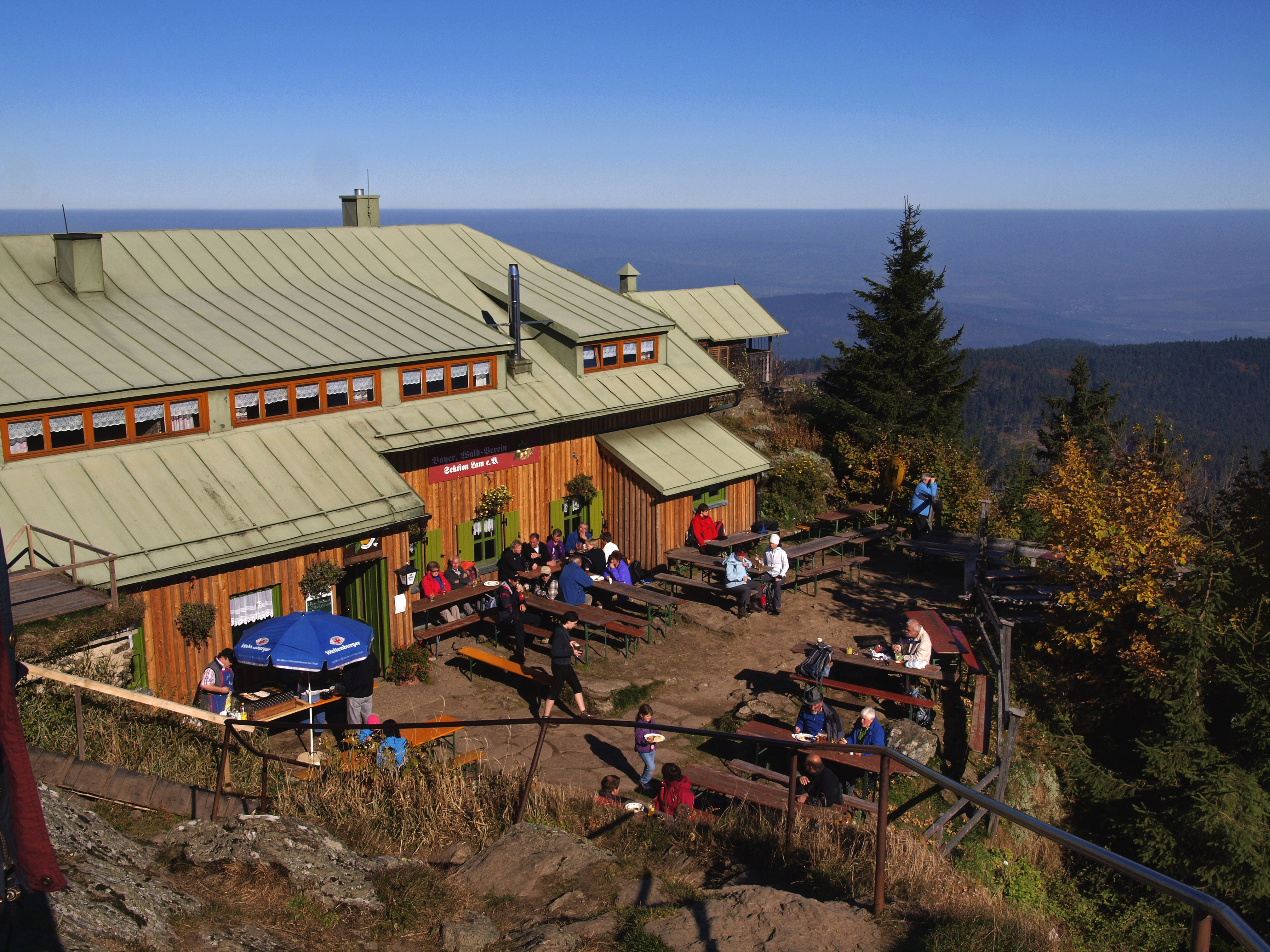 Schutzhütte großer Osser